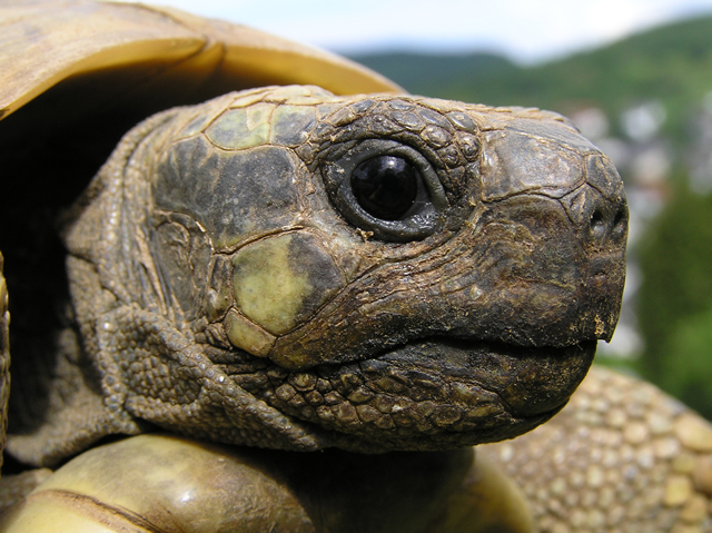 Kopfstudie einer Testudo hermanni boettgeri (Griechische Landschildkröte, Ostrasse)